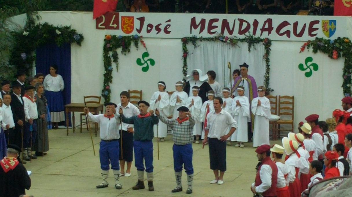 José Mendiague pastoralaren bigarren emanaldia. 2012-VIII-12. Arrokiaga